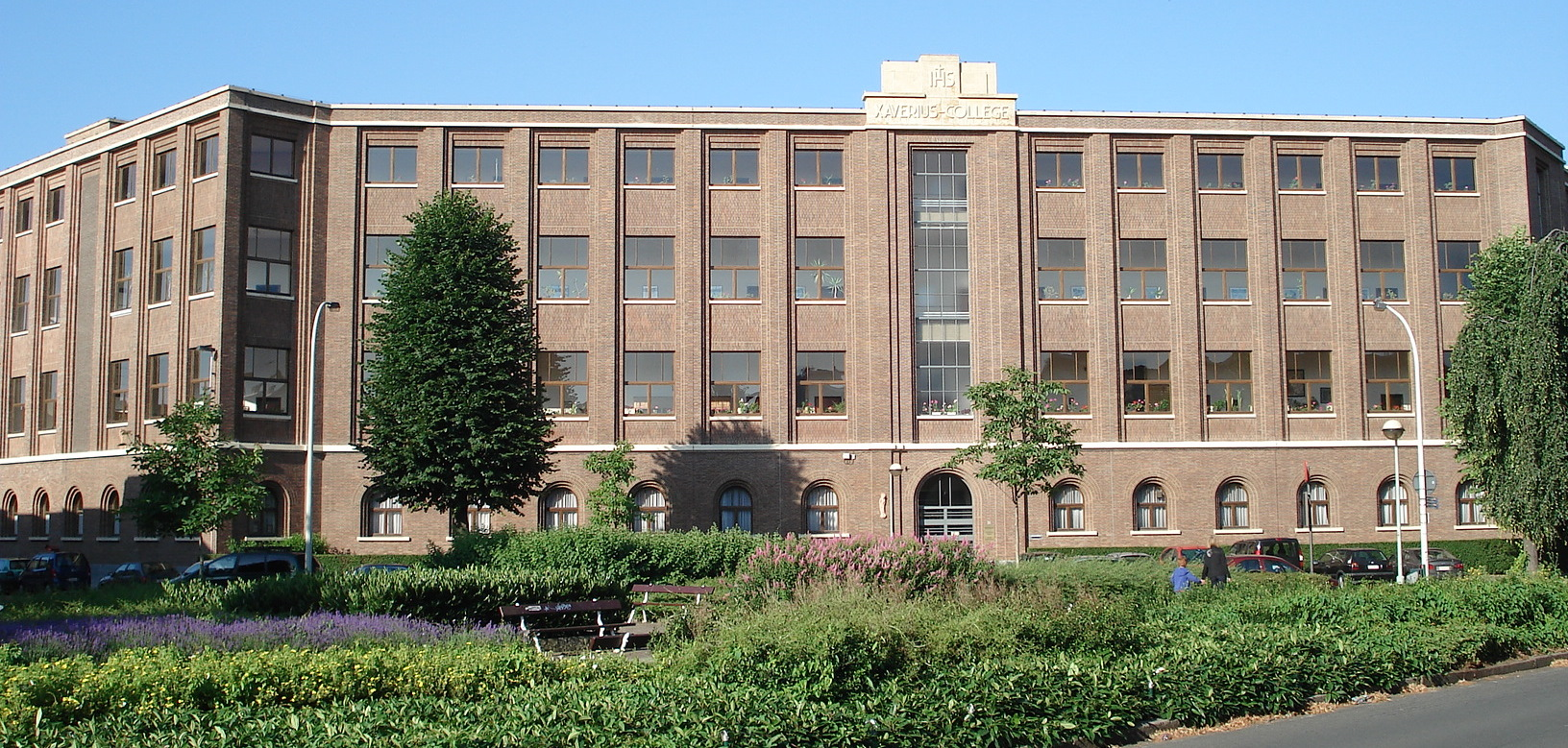 Collège Saint-Xavier à Borgerhout, près d'Anvers. Édifice datant de 1937-1940, plans de l'architecte jésuite J. Taeymans. Façade principale.